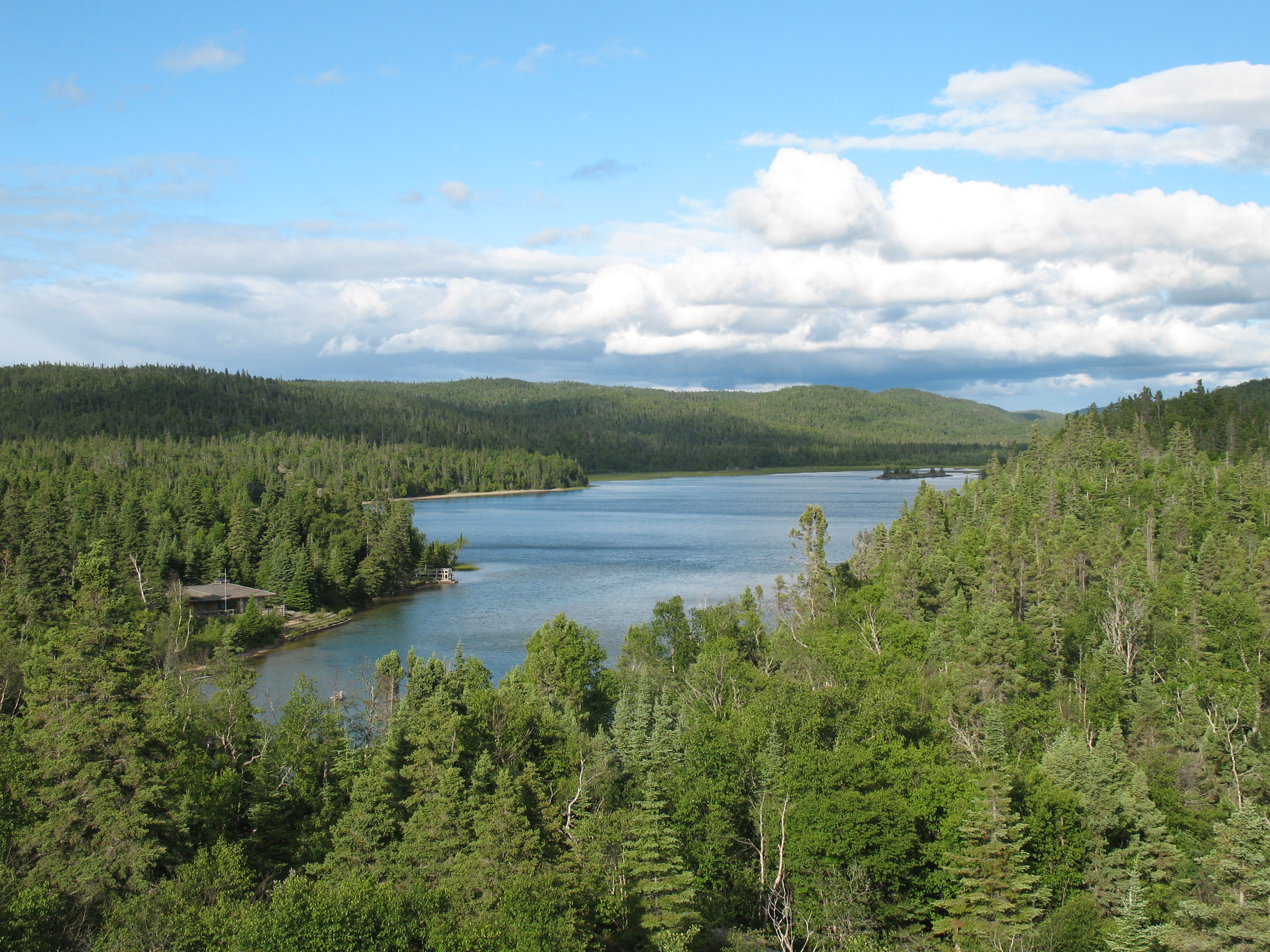 Pukaskwa National Park, Ausblick vom Southern Headland Trail